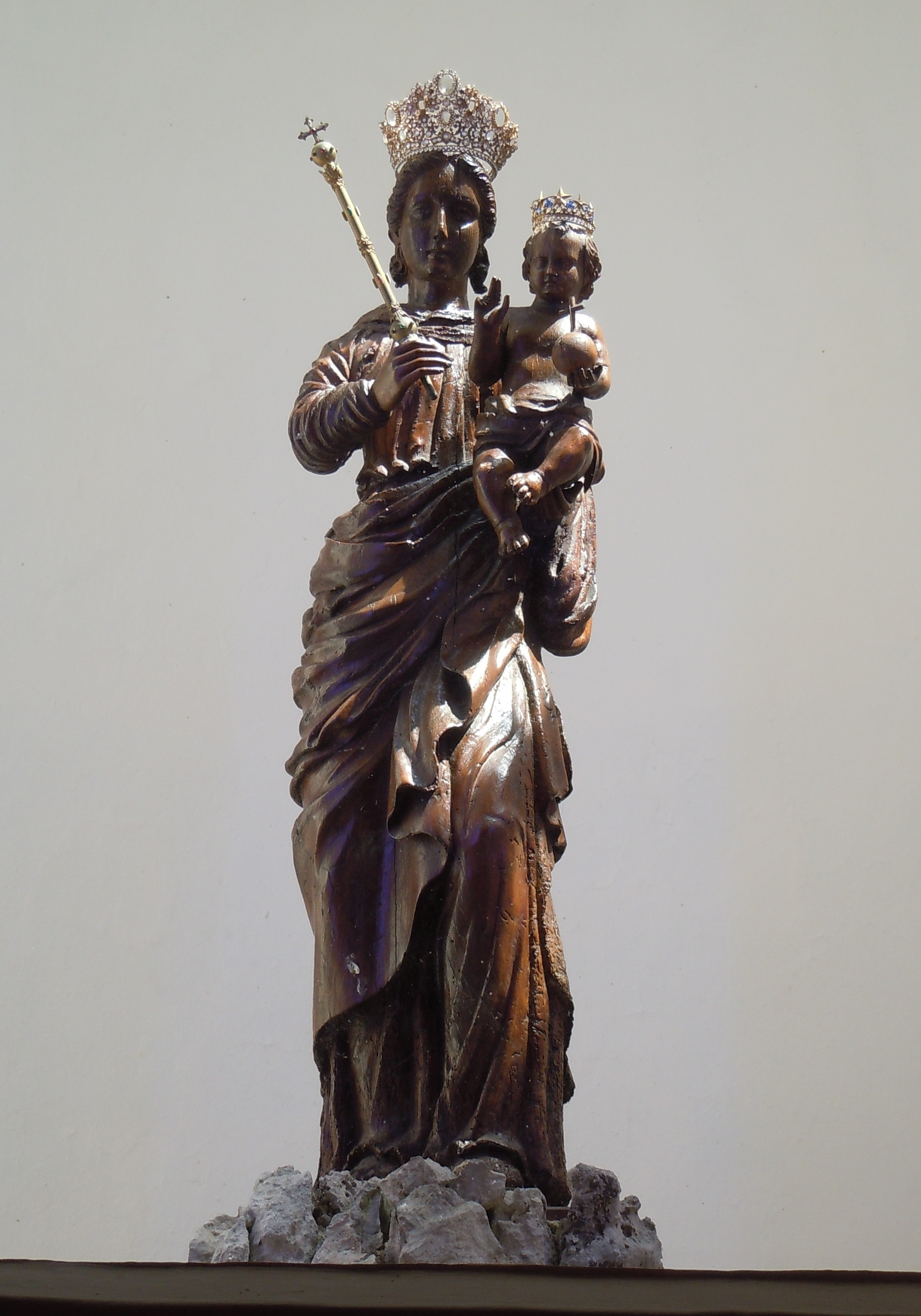 Vierge à l'Enfant - Notre-dame de Bon Secours - Lablachère - Ardèche